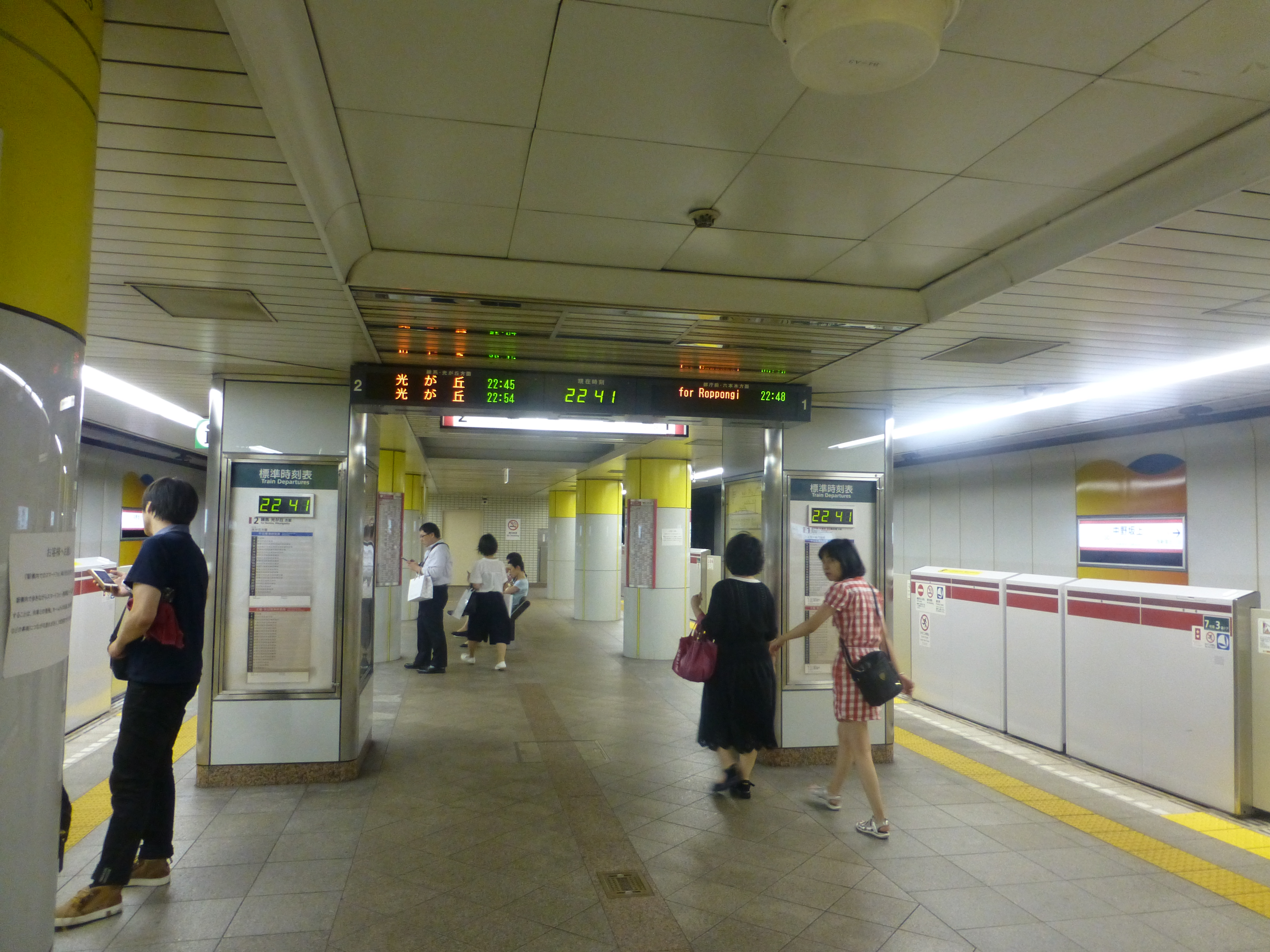 Nakano-sakaue Station platforms (中野坂上駅のホーム)